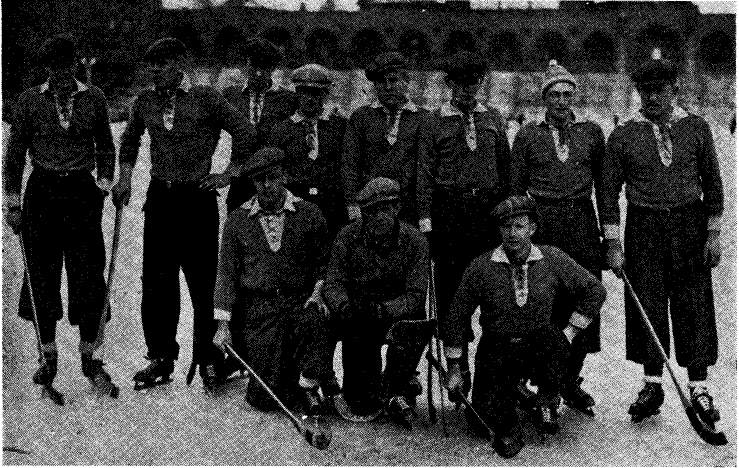 Bandylaget Slottsbrons IF från en bild i Svenska dagbladets årsbok 1934 tillgänglig via projekt Runeberg. Bildtext: "Slottsbrons IF, svenska mästare i bandy efter att i omspelsmatch ha slagit UppsalaKamraterna med 6—O på Sandbäckstjärnet utanför Karlstad; stående fr, v. Göran Funke, Harald Törn-kvist, Karl Funke, Henry Klarkvist, Arne Knös, Ragnar Nilsson, Hjalmar Klarkvist och Gunnar Stridsberg: på knä: Tore Magnusson, Curt Nilsson och Folke Svärd. "